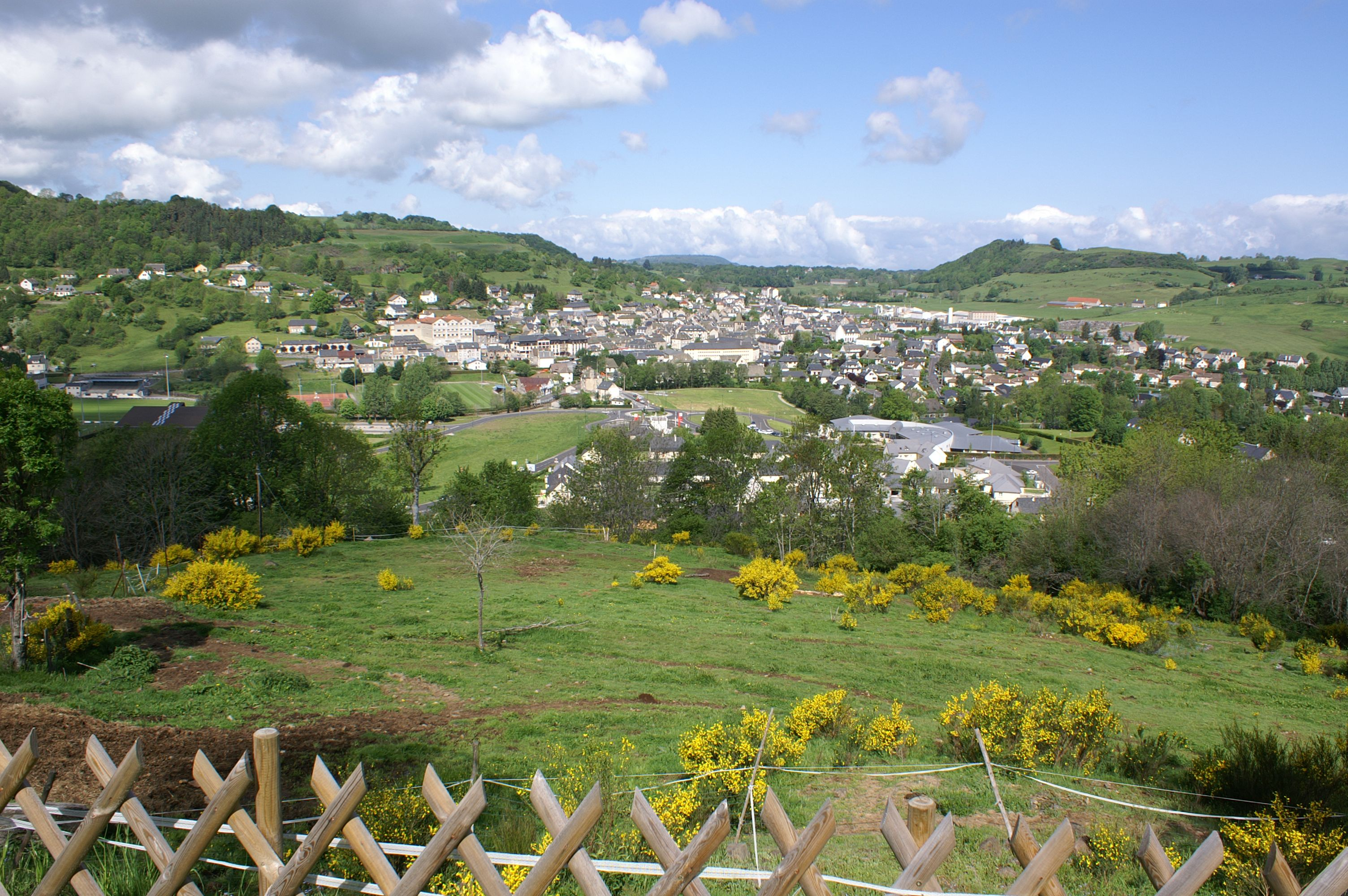 Vue générale de Riom-ès-Montagnes, commune du département du Cantal, en France.